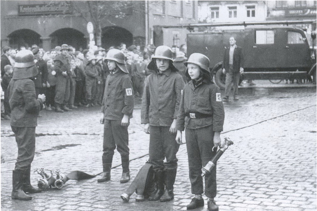 Freiwilligen Feuerwehr der Deutschen Demokratischen Republik bis 1990, hier "Junge Brandschutzhelfer".